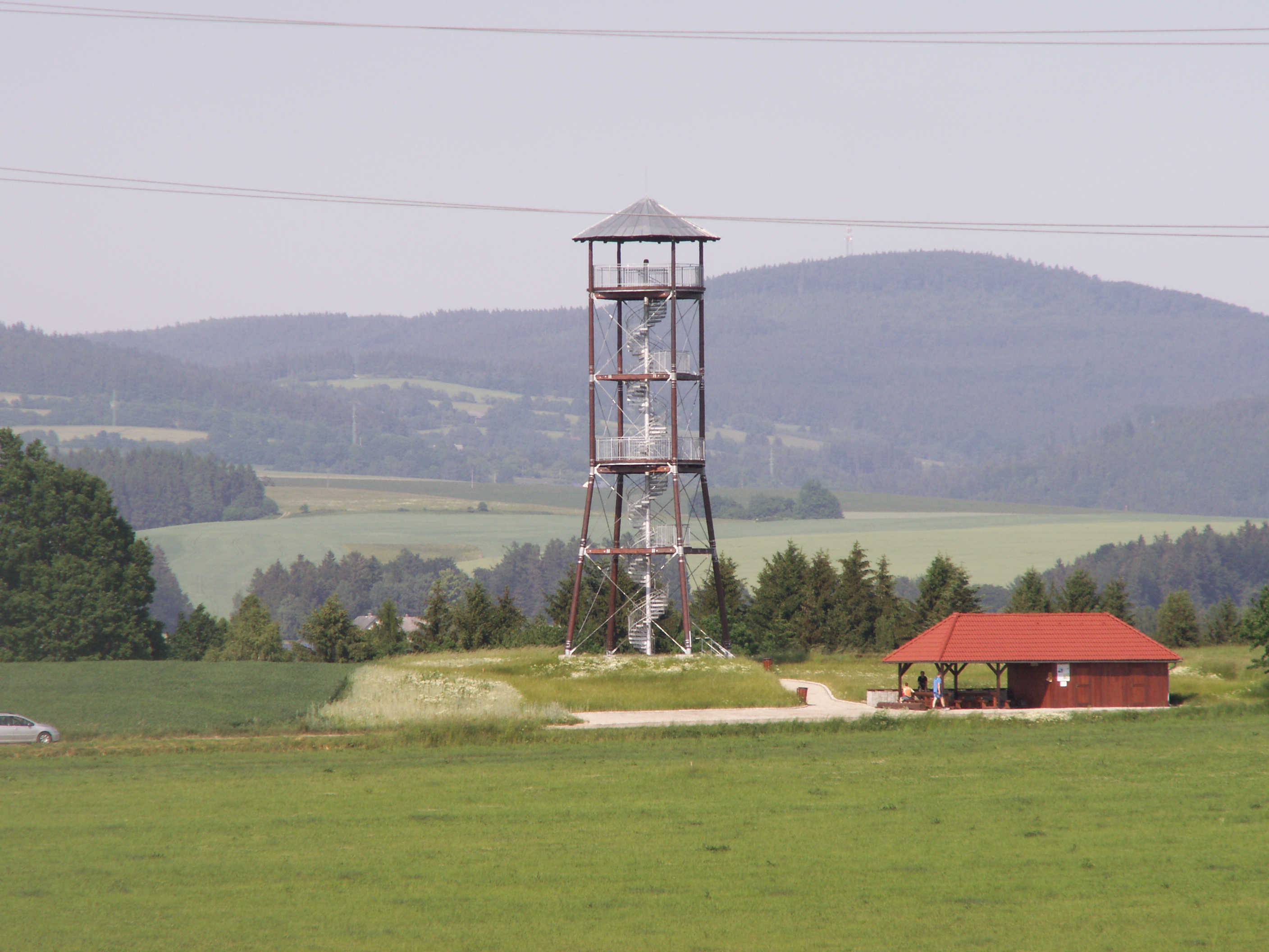 Rozhledna Mariánka, Horní Čermná, okres Ústí nad Orlicí